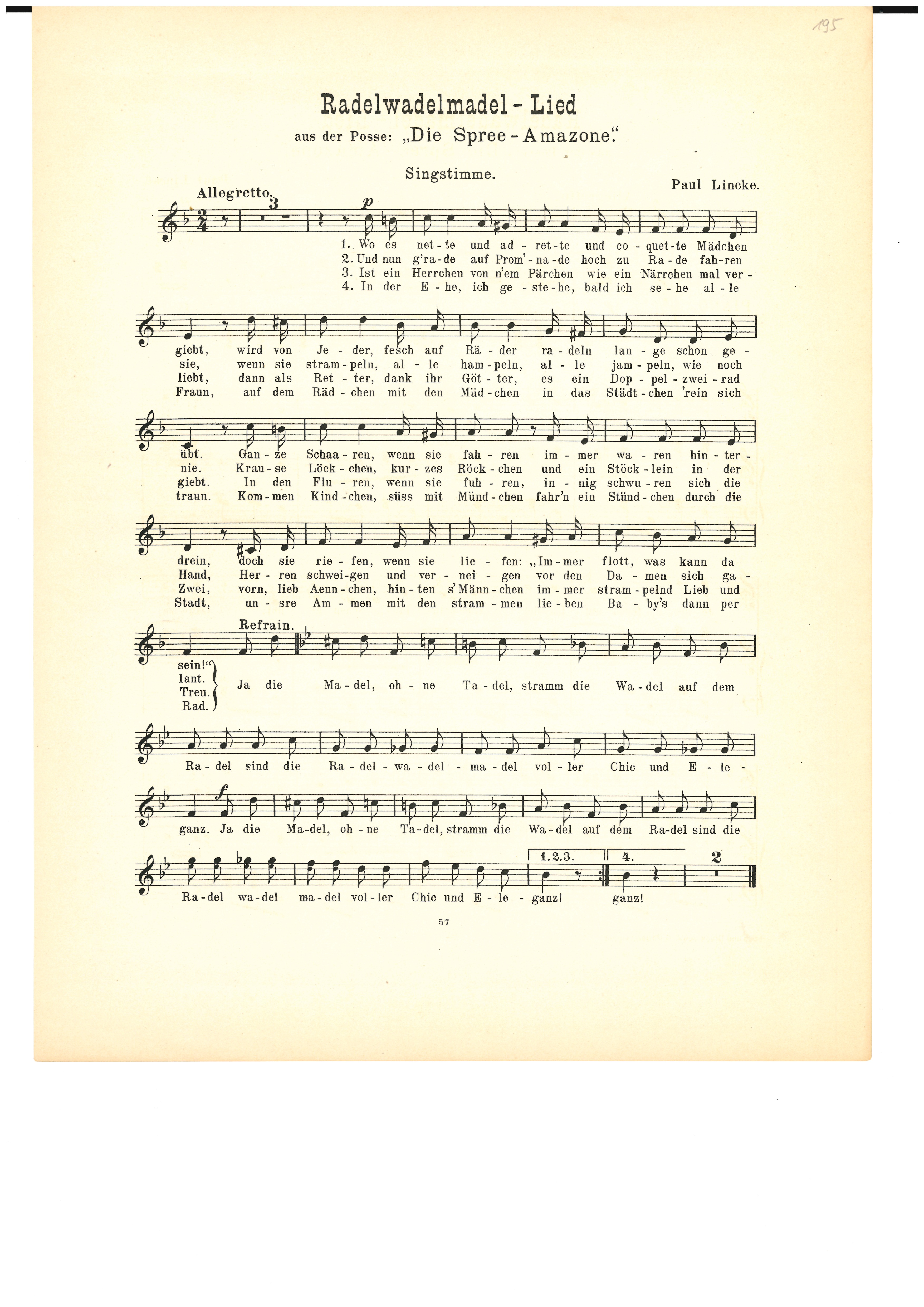 "Radelwadelmadel-Lied aus der Posse: ,Die Spree-Amazone'", 2. Auflage, o. D. [um 1896] (Klavier), Karl Köhler, Verlagsbuchhandlung Charlottenburg, Nr. 57 (Bl. 193-195)